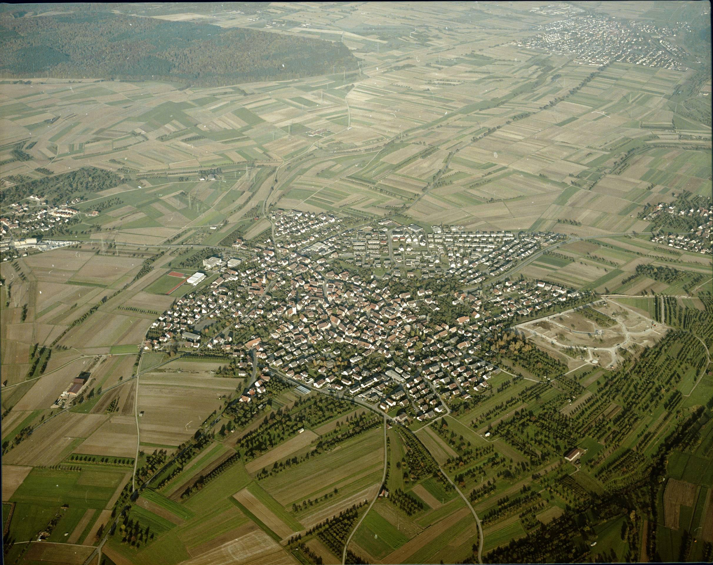 Luftbild von Kuppingen - Staatsarchiv Sigmaringen - Archivalieneinheit N 1/96 T 1 Nr. 495